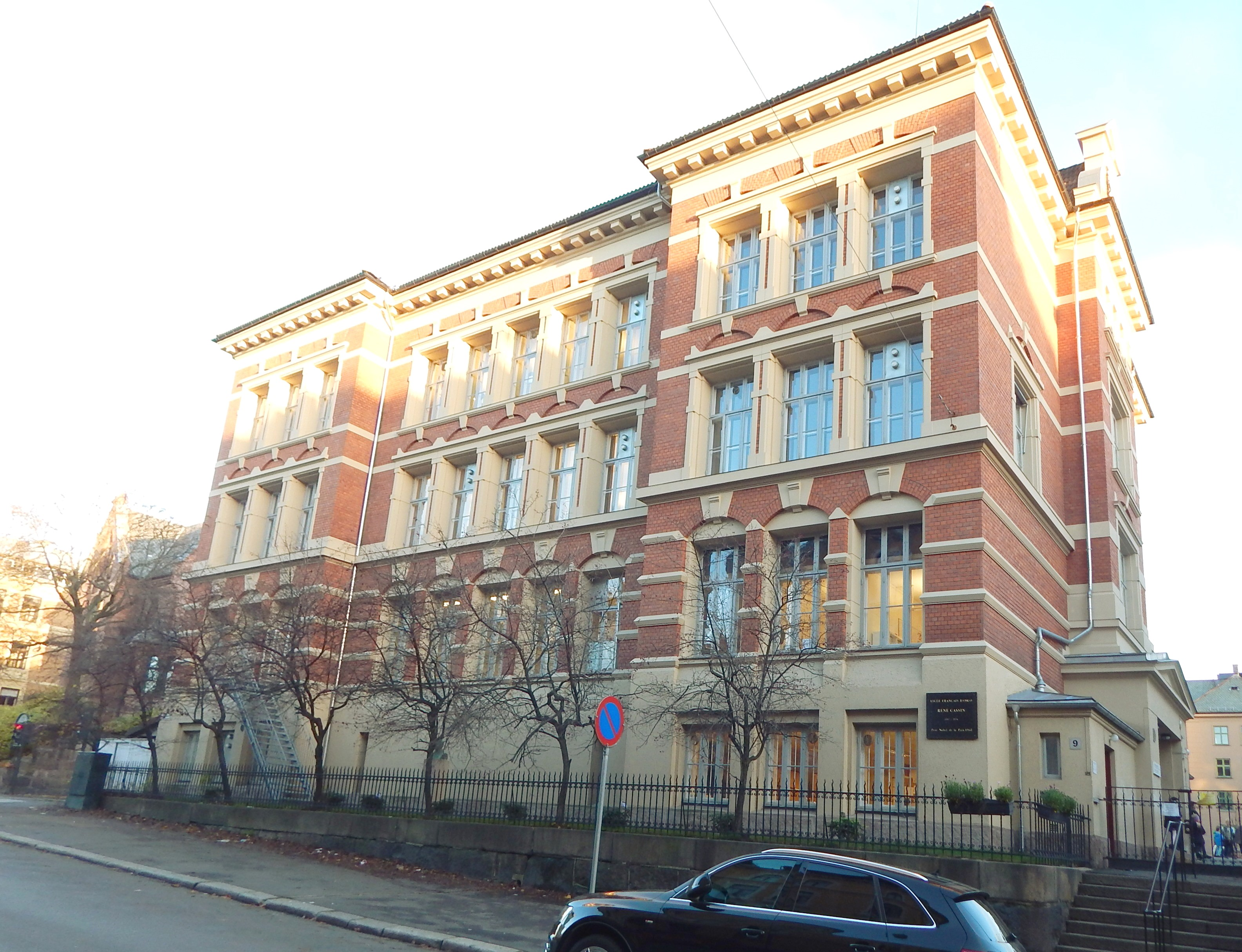 Tidligere Vestheim skole, nå Lycée français René Cassin d'Oslo Skovveien 9